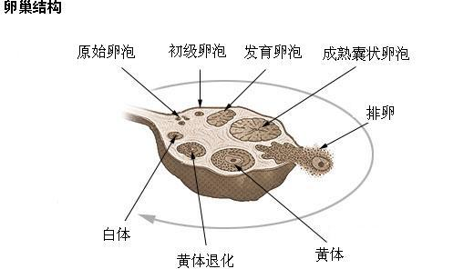 中文（中国大陆）: 卵巢结构